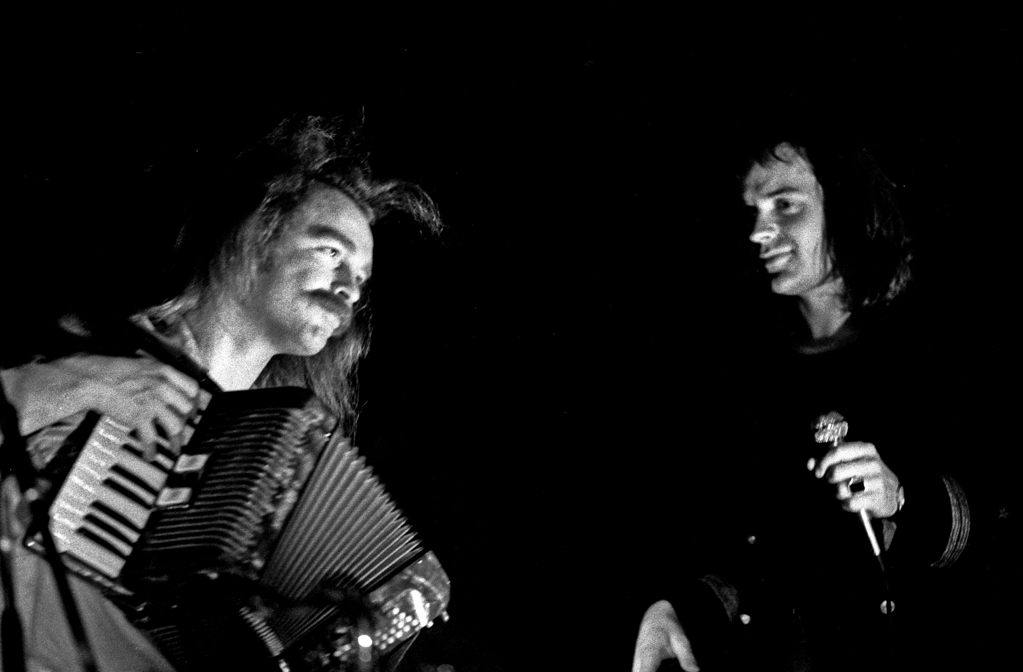 Udo Lindenbergs Panik-Orchester 1974 in der Hamburger Musikhalle. "Und der Nervenarzt weiß auch nicht mehr, wie's weitergeht": Hier Udo und Gottfried Böttger